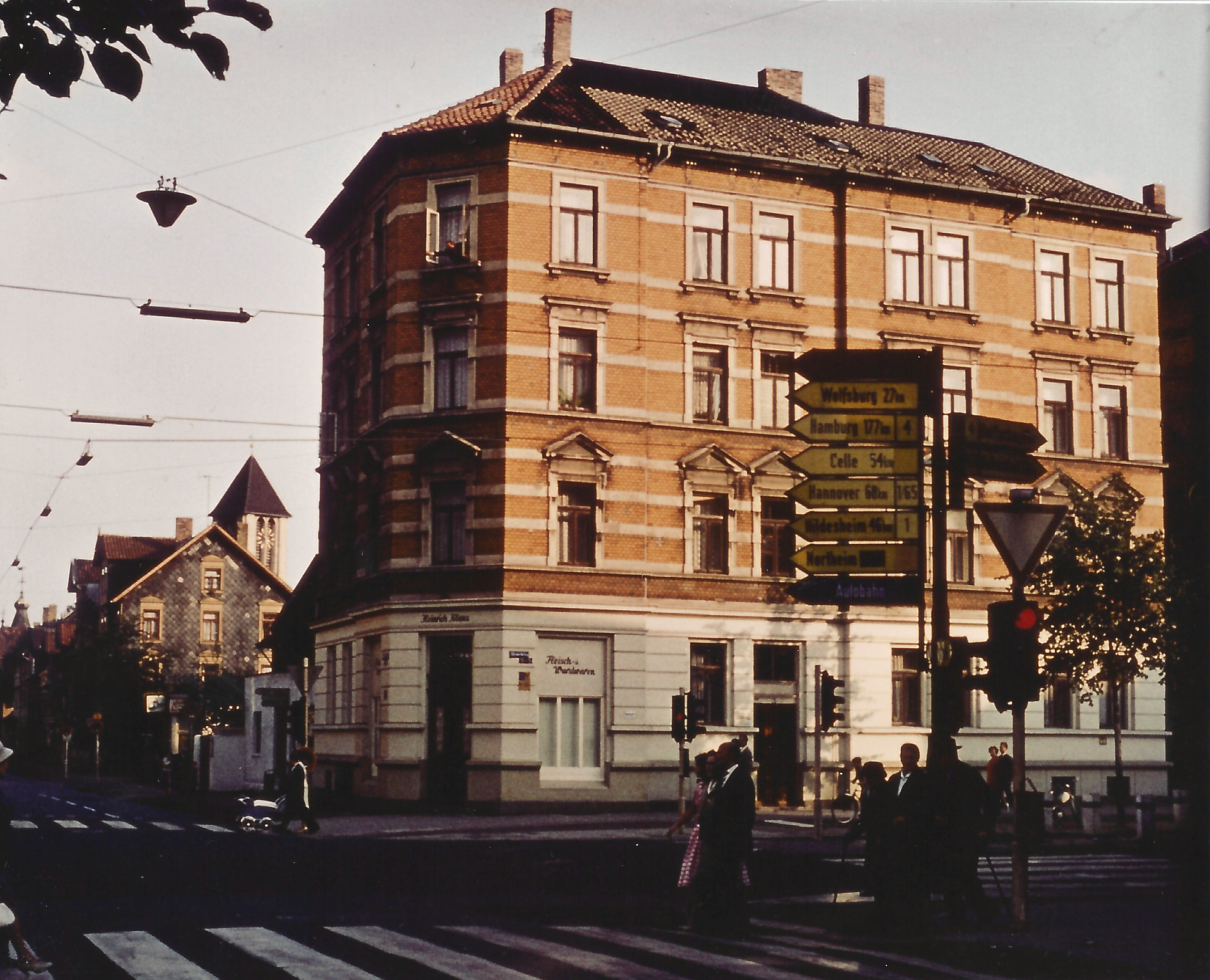 Eckhaus Altewiekring 70 in Braunschweig vermutlich vor 1970 mit Straßenkreuzung und Johanniskirche im Hintergrund.